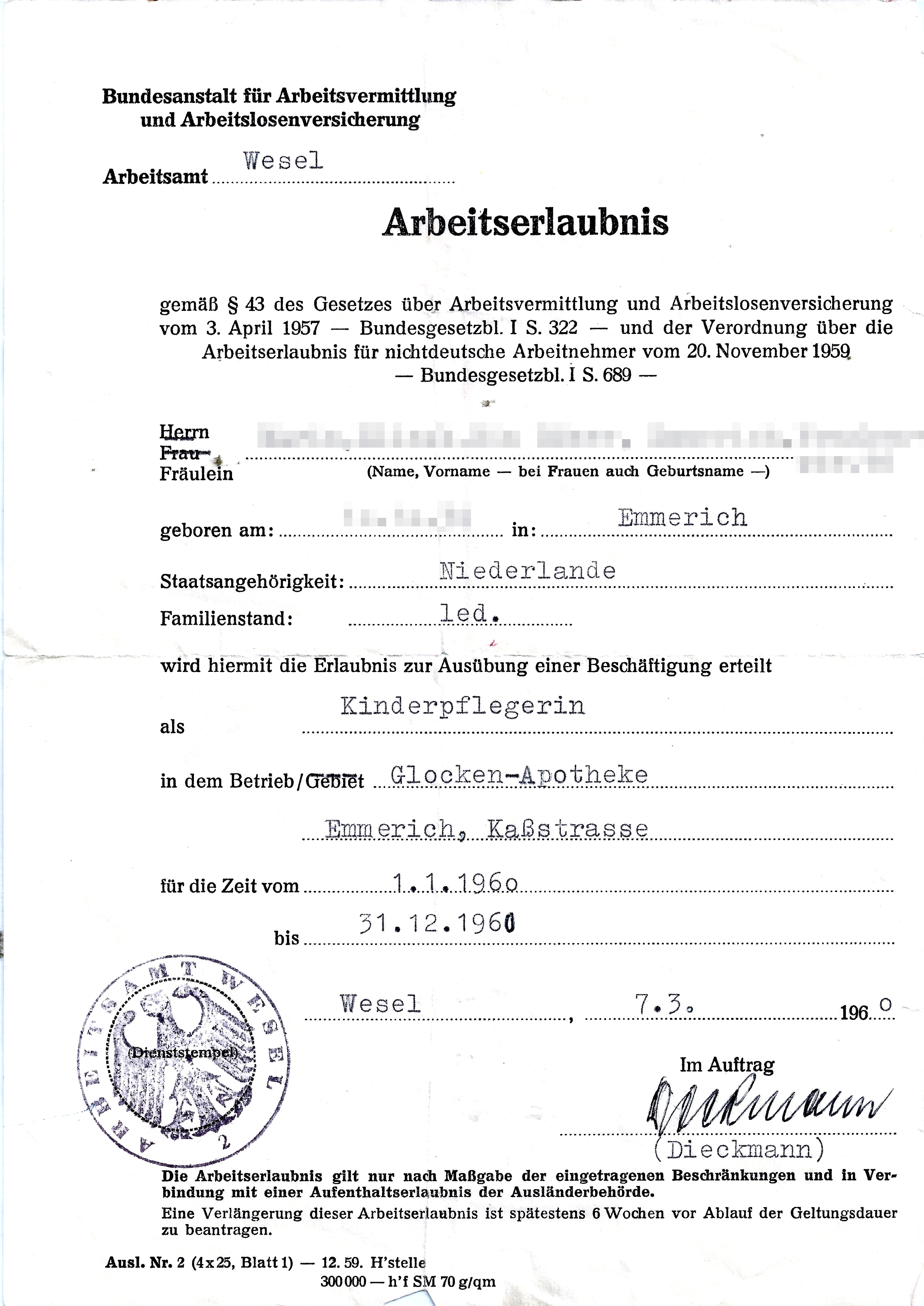 Arbeitserlaubnis der Bundesanstalt für Arbeitsvermittlung und Arbeitslosenversicherung, ausgestellt vom Arbeitsamt Wesel, 1960